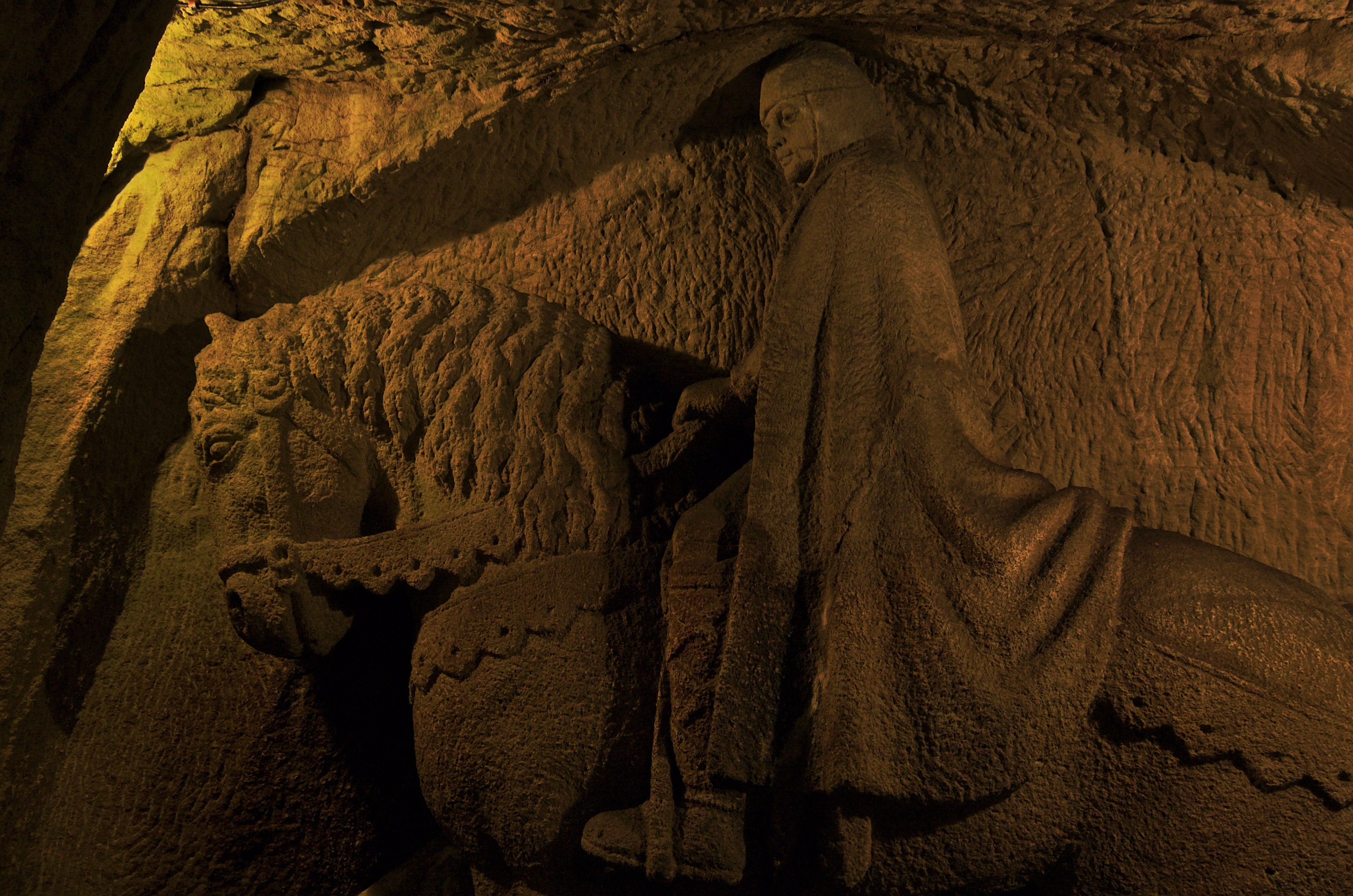 Jeskyně Blanických rytířů, Kunštát, okres Blansko